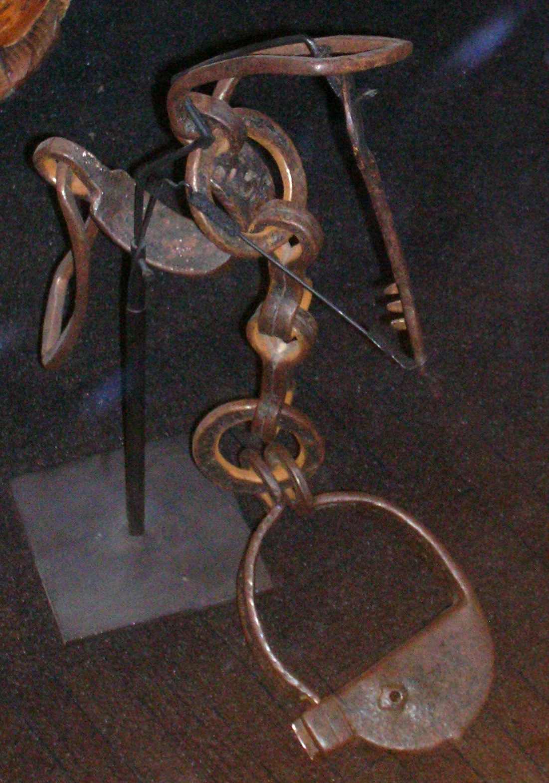 Entrave pour cheville d'esclave, utilisée sur les navires, en fer, XVIIIe siècle.